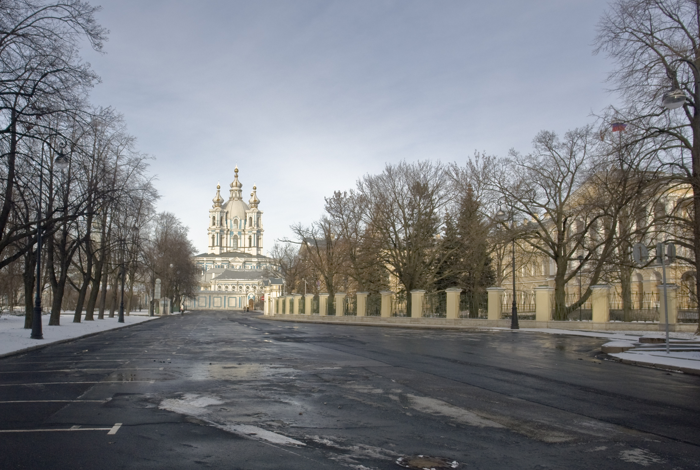 Проезд Смольного